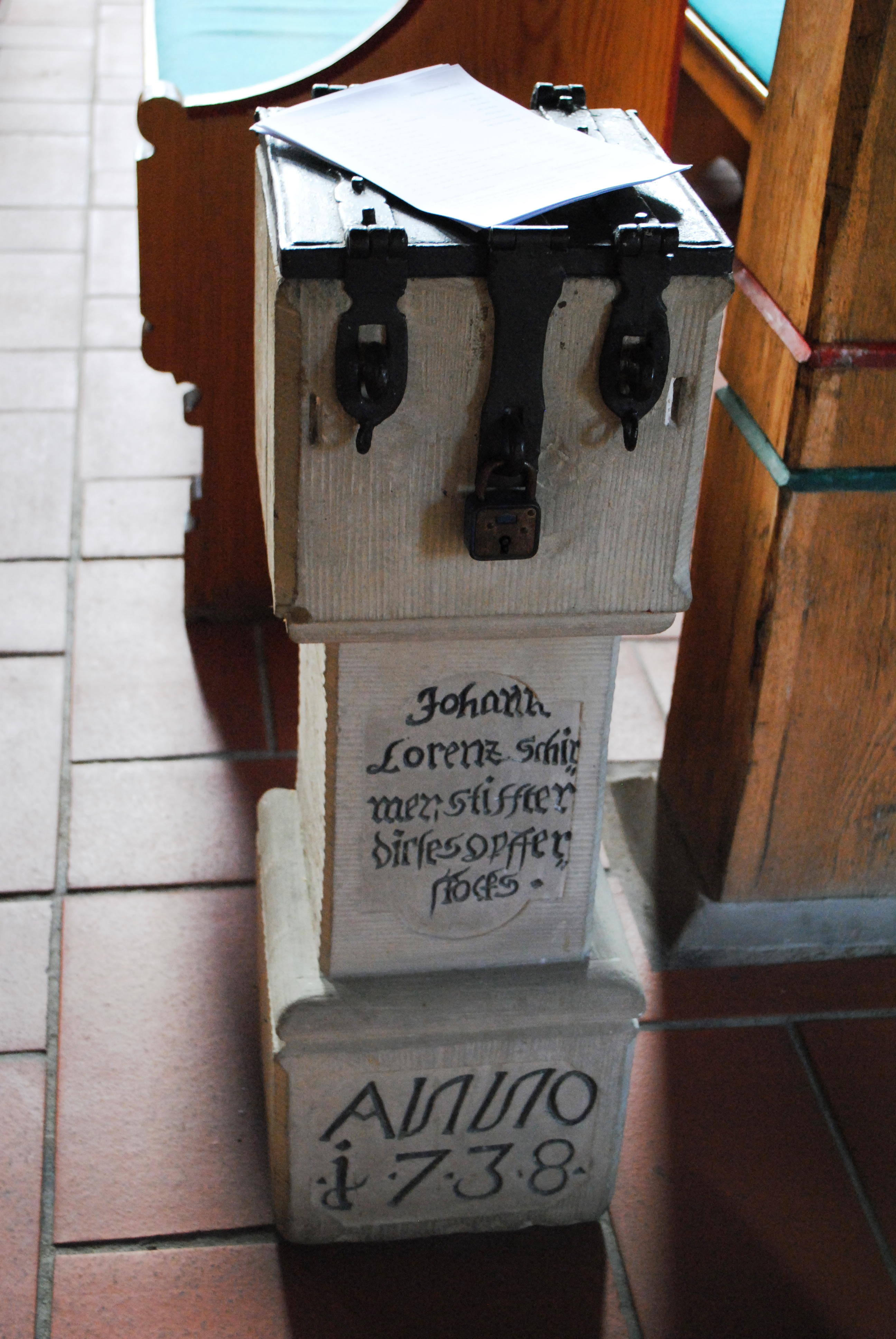 Opferstock, Kirche, Eichfeld